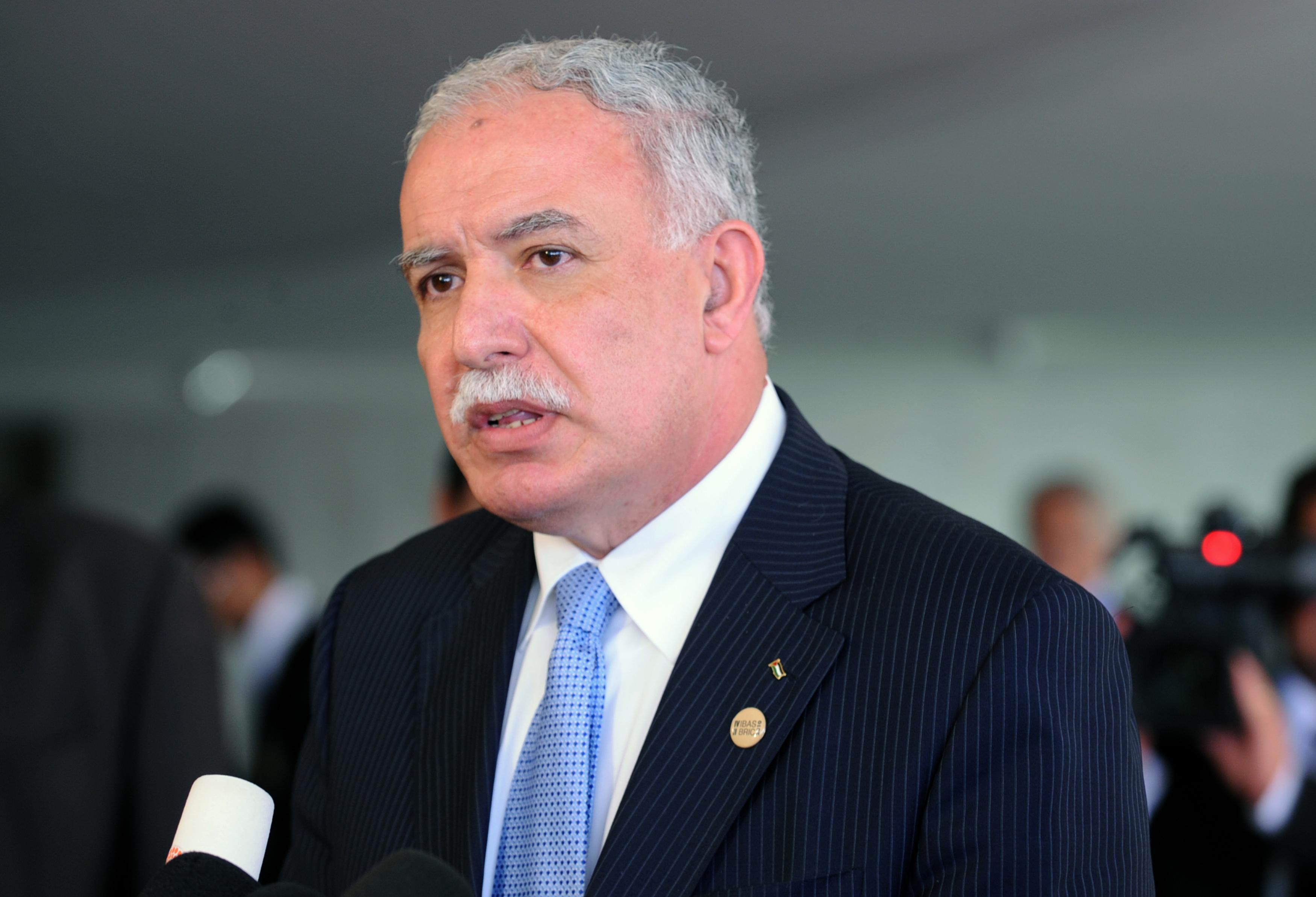 Brasília - O chanceler palestino, Riad Al-Malki, durante entrevista coletiva no Plácio do Itamaraty (Roosewelt Pinheiro/ABr)